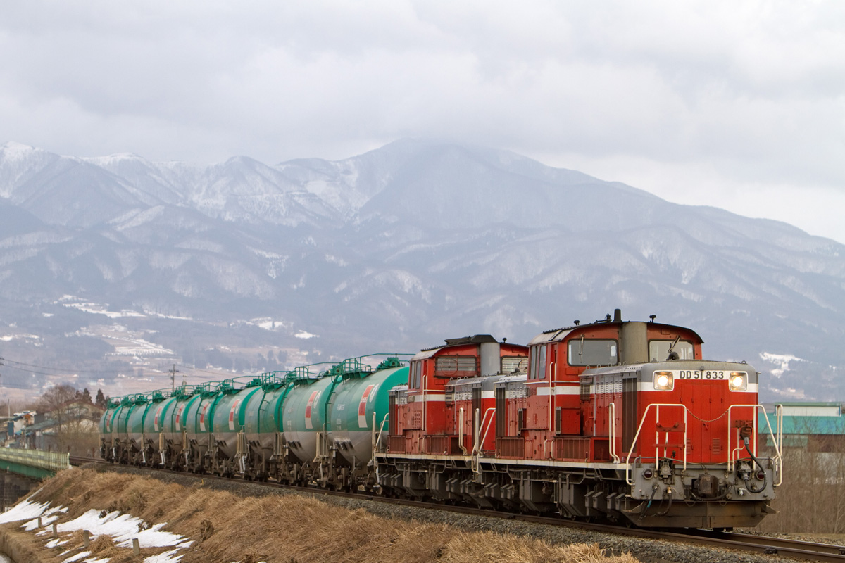 東日本大震災の影響で磐越西線経由で運転された臨時石油輸送列車